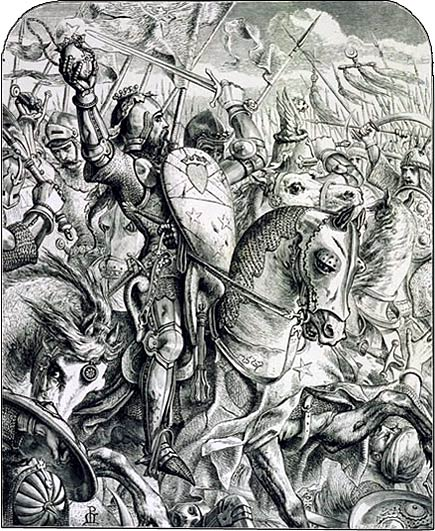 Gravering av Sir James Douglas (1286-1330), ved Joseph Noel Paton (1821-1904), oppbevares i Nasjonalmuseumet i Skottland.